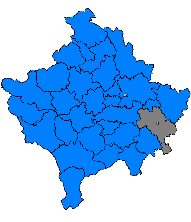 Gjilan, Kosovë 2006